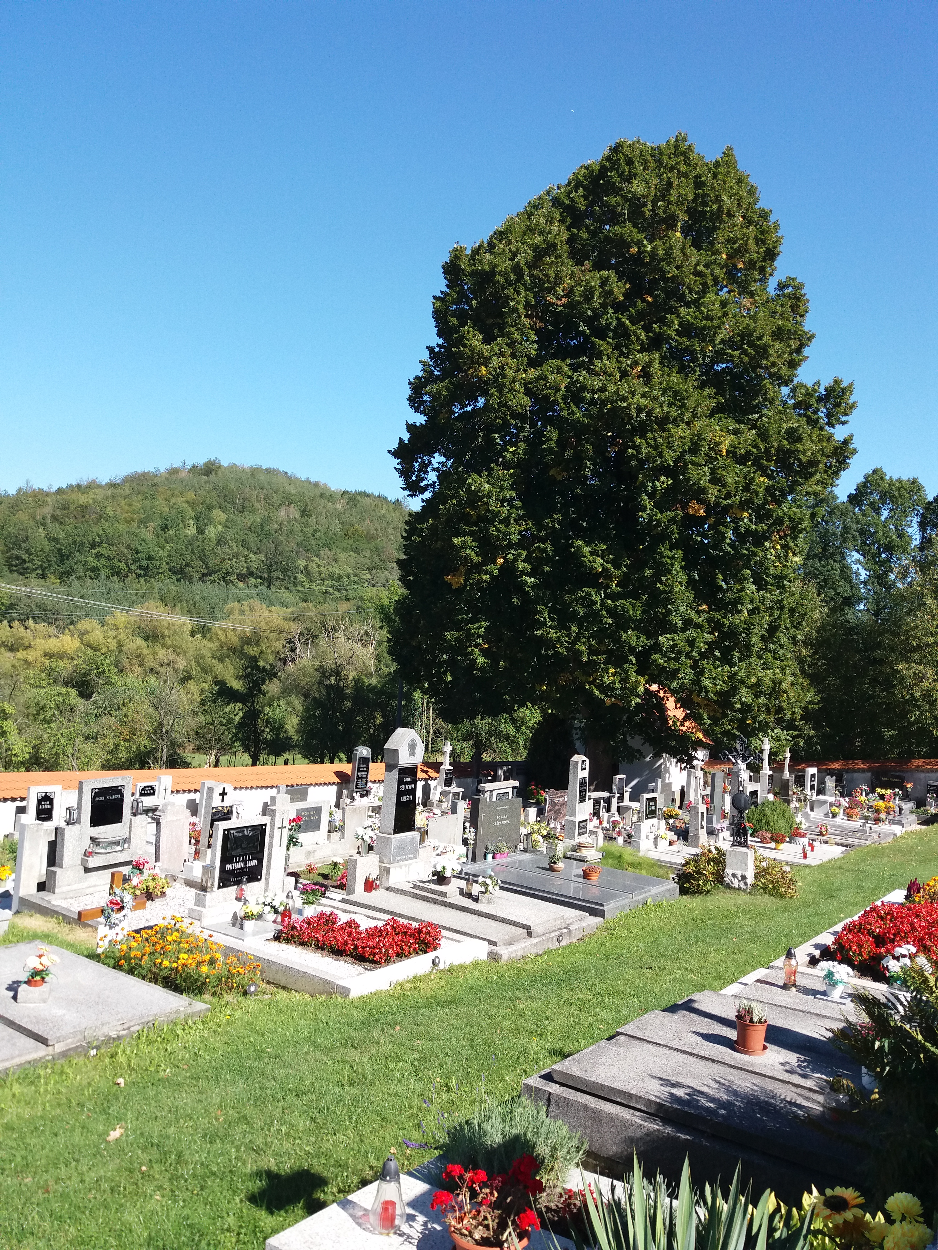 Na hřbitově v Nezdicích